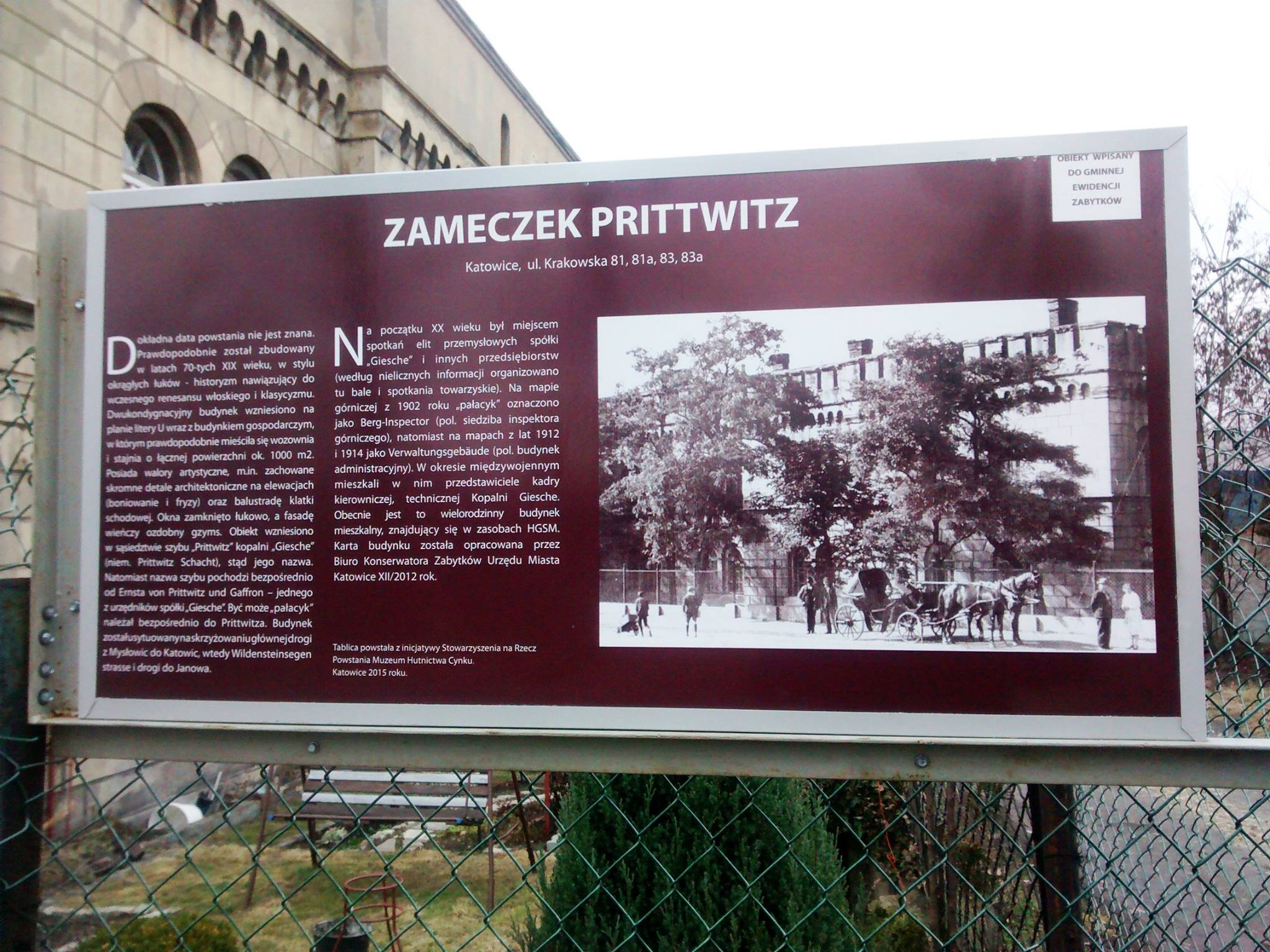 Tablica informacyjna - budynek przy ul. Krakowskiej 81-83 w Katowicach-Szopieniach